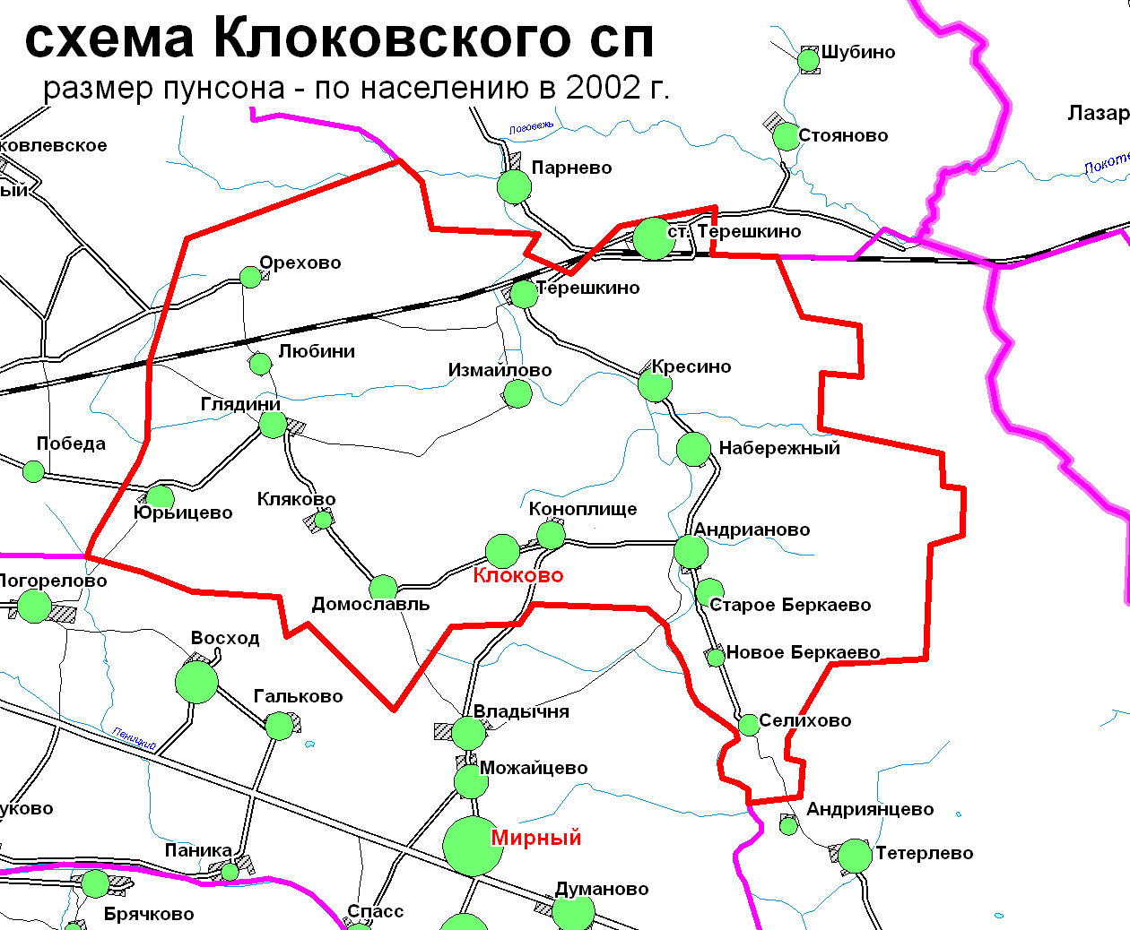 Схема Клоковского сп в Торжокском р-не